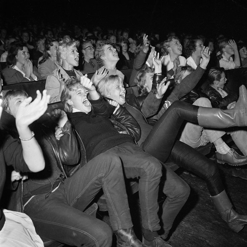 Biblioteksgatan 26, Biograf Anglais. Publik i extas under Tommy Steeles konsert